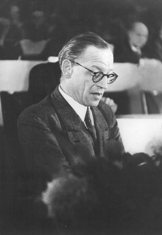 ADN-ZB/Igel-7.10.1949 Berlin: Gründung der Deutschen Demokratischen Republik am 7.10.1949. Im Gebäude der DWK (Deutsche Wirtschaftskommission) in der Leipziger Straße fand am 7.10.1949 die 9. Tagung des Deutschen Volksrates statt, auf der das Manifest der Nationalen Front des demokratischen Deutschland verkündet wurde. Der Deutsche Volksrat konstituierte sich zur Provisorischen Volkskammer der Deutschen Demokratischen Republik. Georg Dertinger bei seiner Ansprache. 4131-49